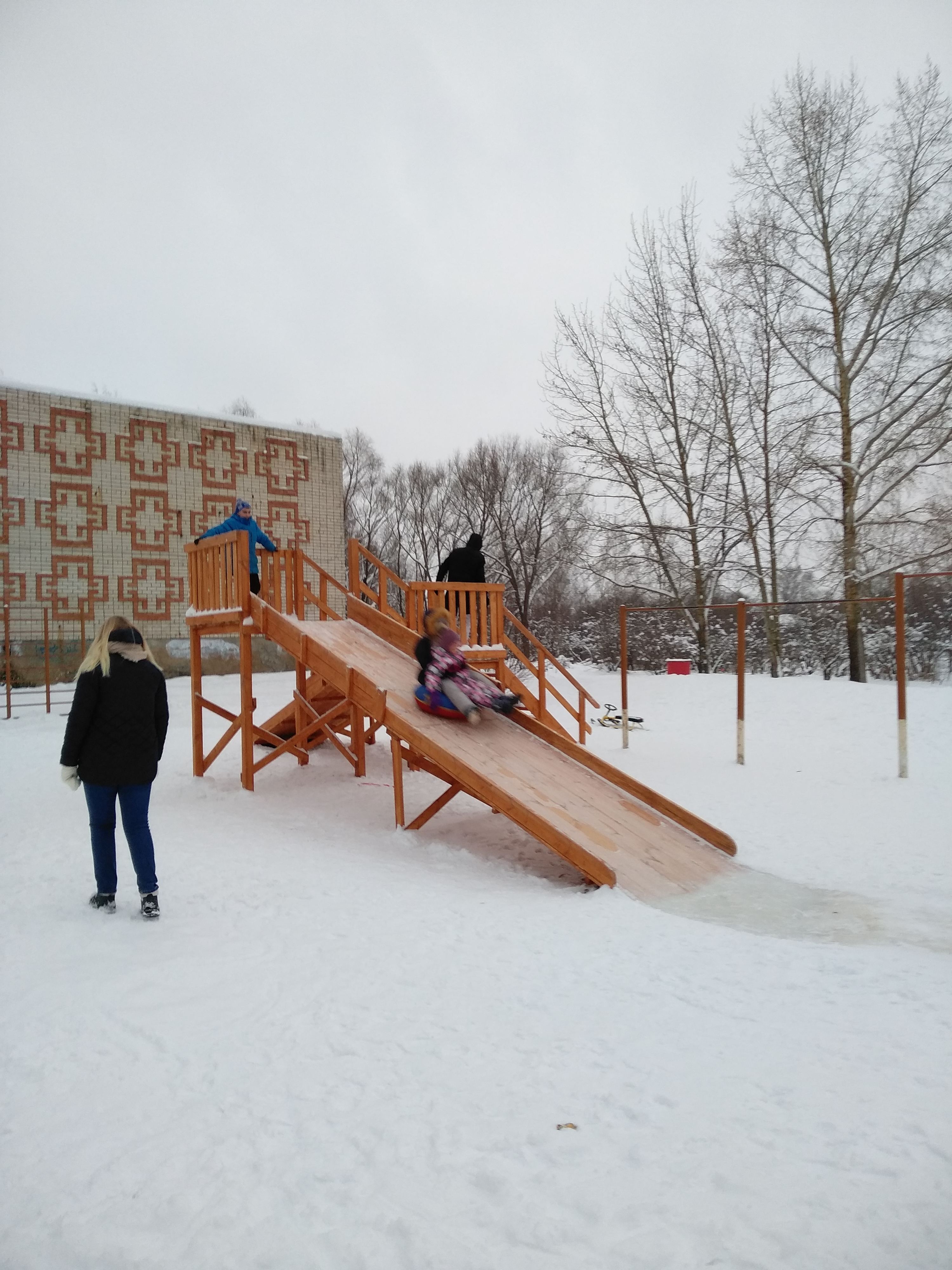 Катание с горки в Шурсколе. Горку открыли в ноябре 2018 года. У горки 2 склона, а также некоторые умельцы катаются на ватрушке прямо по лестнице